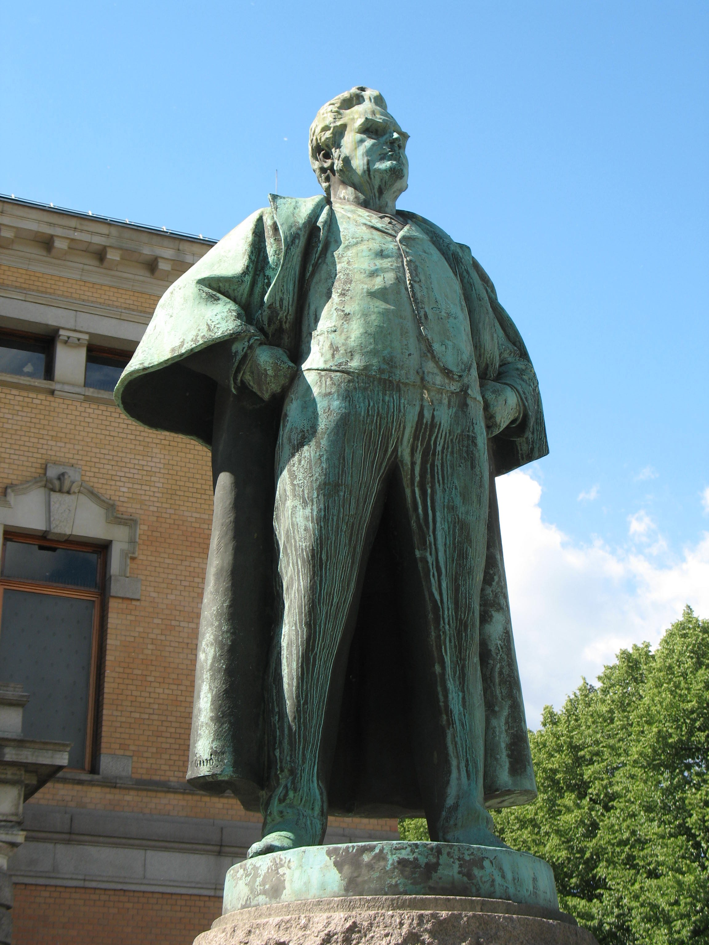 Statue av Bjørnstjerne Bjørnson utenfor Nationaltheatret i Oslo